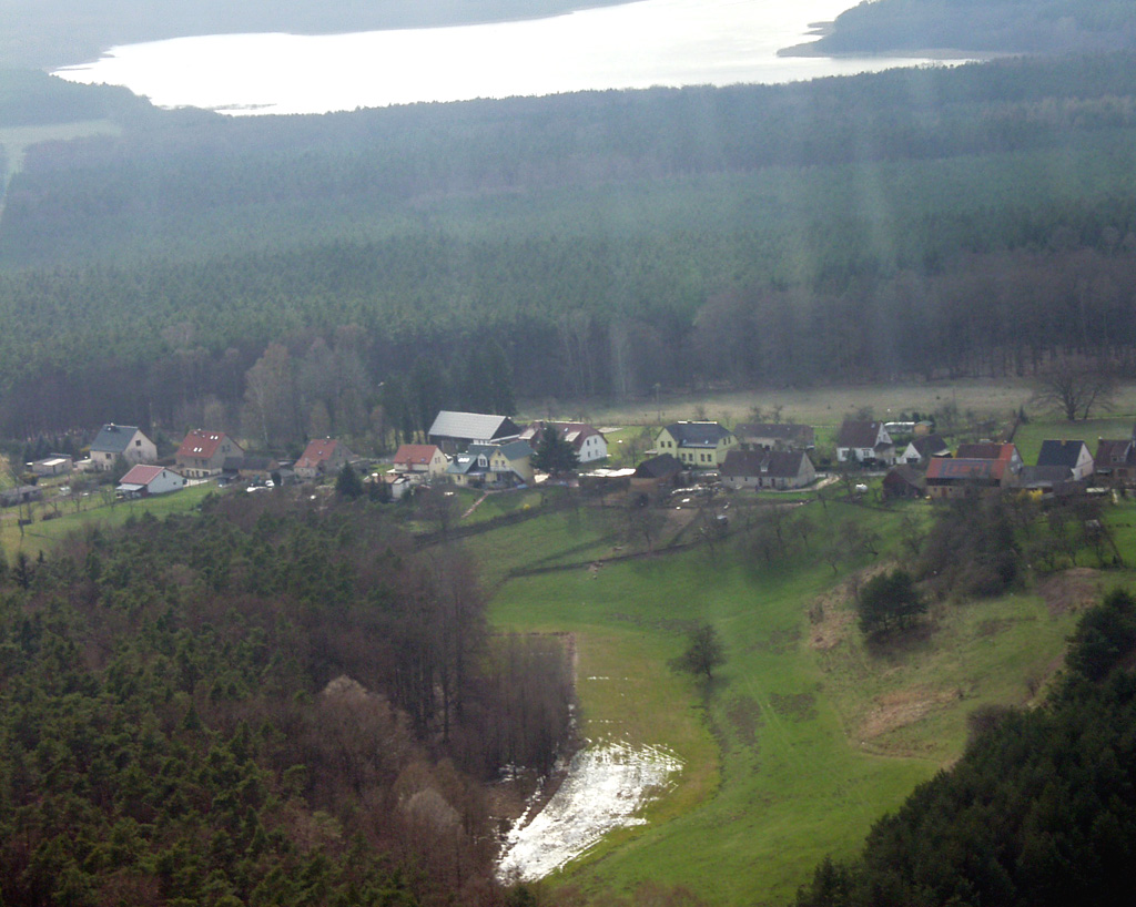 Zu sehen ist das Mecklenburgische Dorf Neu Canow und der Labussee.